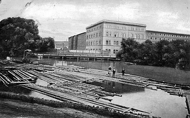 Młyny Rothera - stara pocztówka